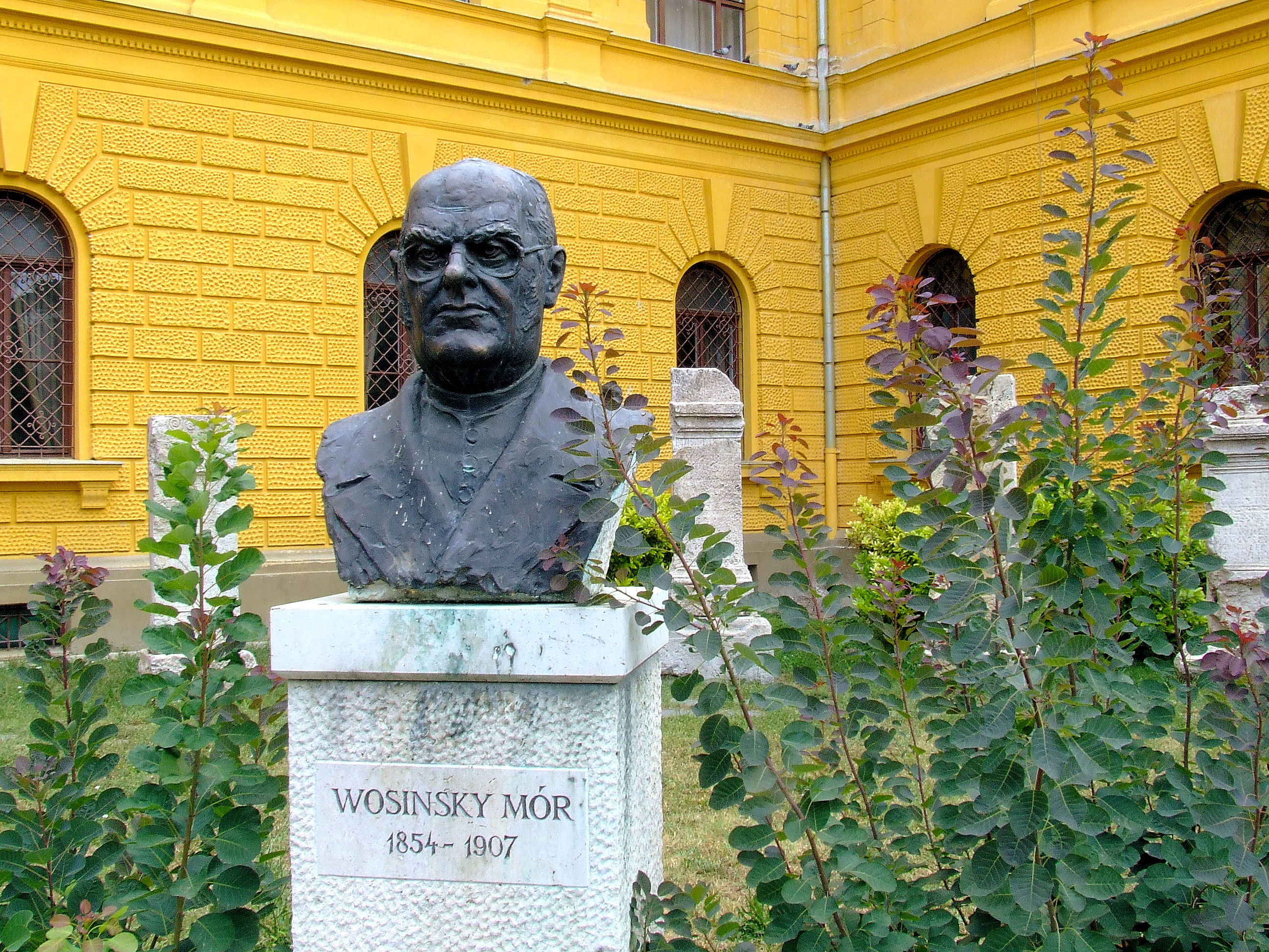 Wosinszky Mór szobra Szekszárdon a nevét viselő múzeum előtt. Farkas Pál alkotása (1982)